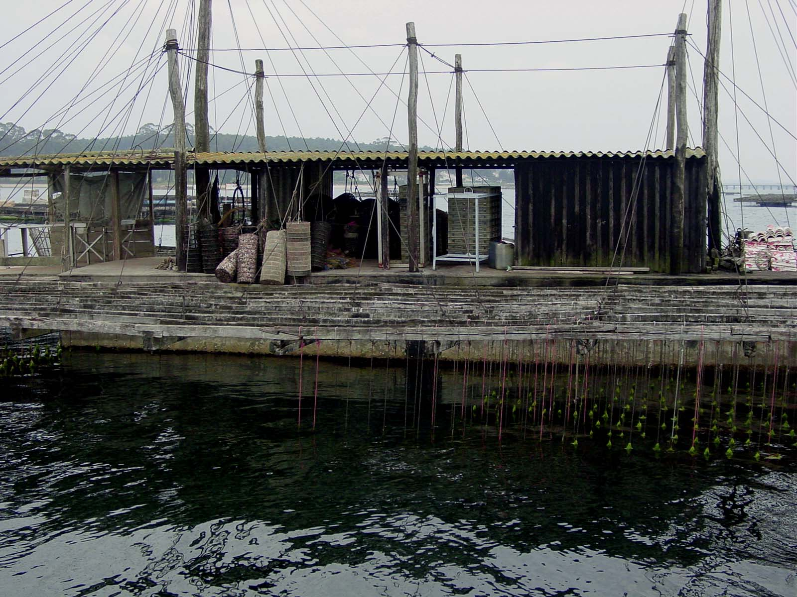 Batea nas Rías Baixas Viveiros de ostras e mexilhões Mussels and oysters fisheries